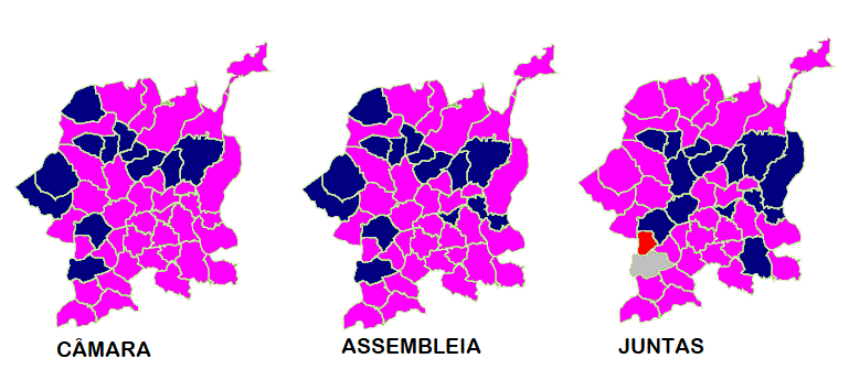 Partido mais votado por Freguesia